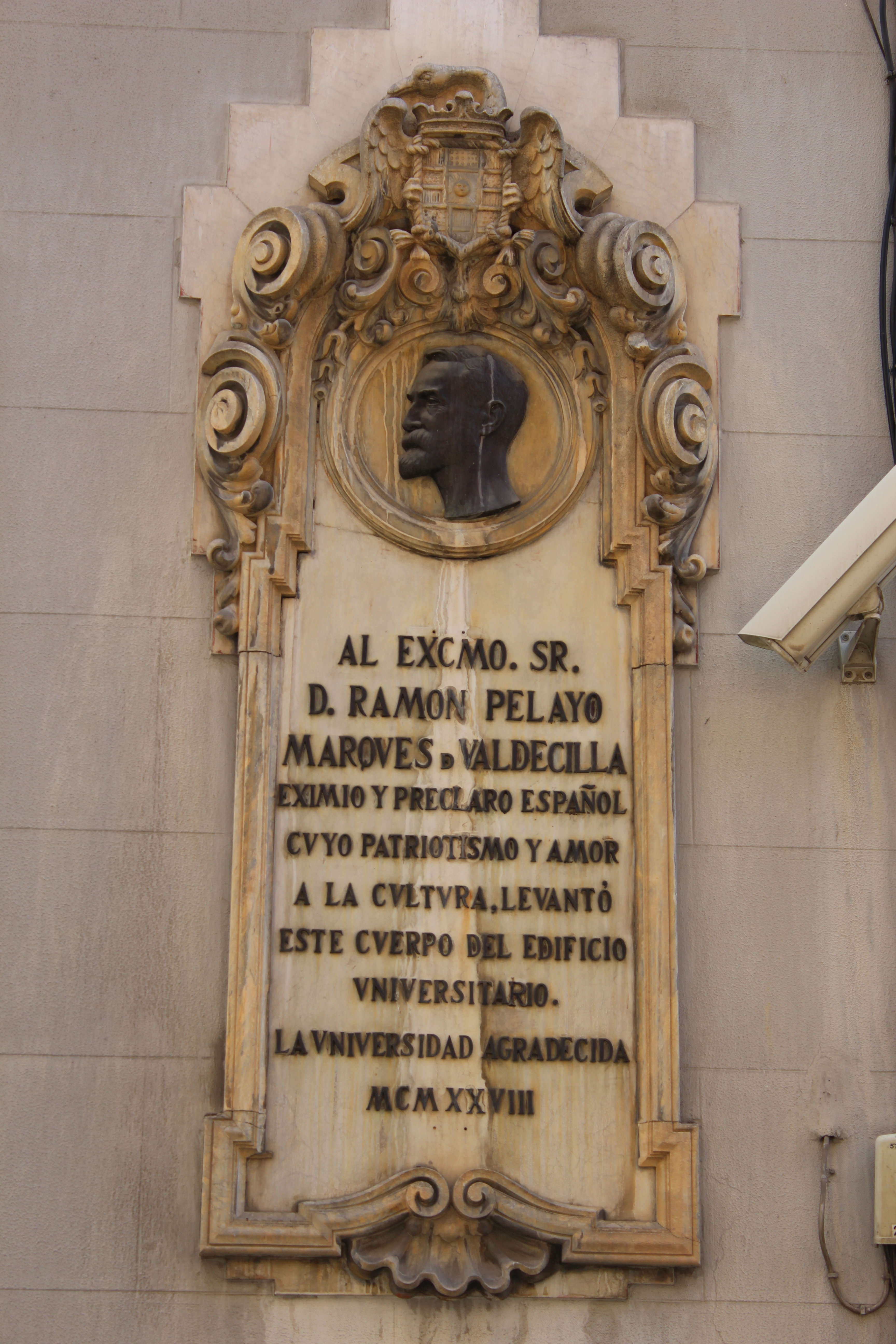 Lápida conmemorativa de Ramón Pelayo, calle del Noviciado, Madrid.